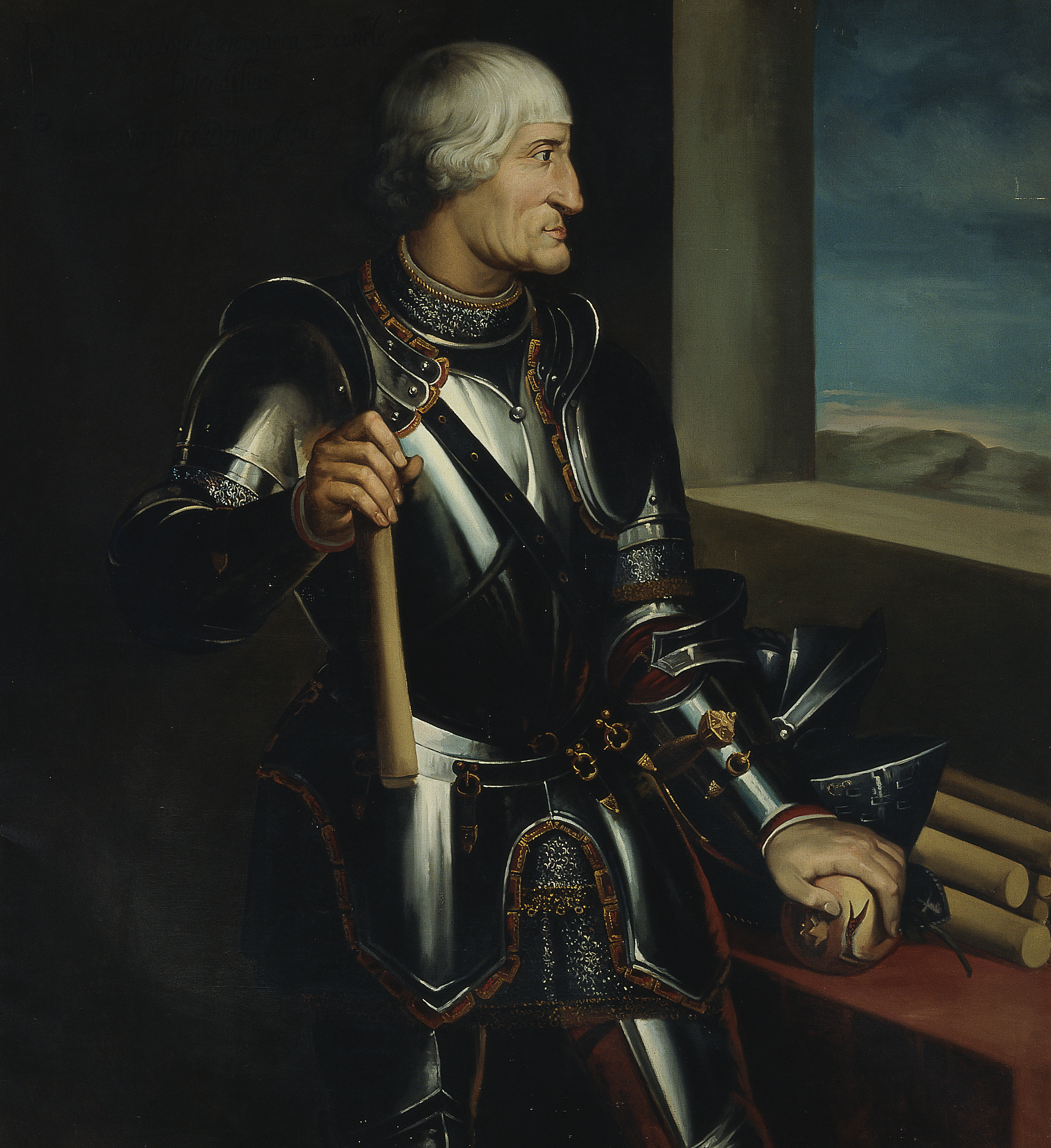 Retrato del militar y político castellano Íñigo López de Mendoza y Quiñones (1440-1515), que fue el primer marqués de Mondéjar y el segundo conde de Tendilla.